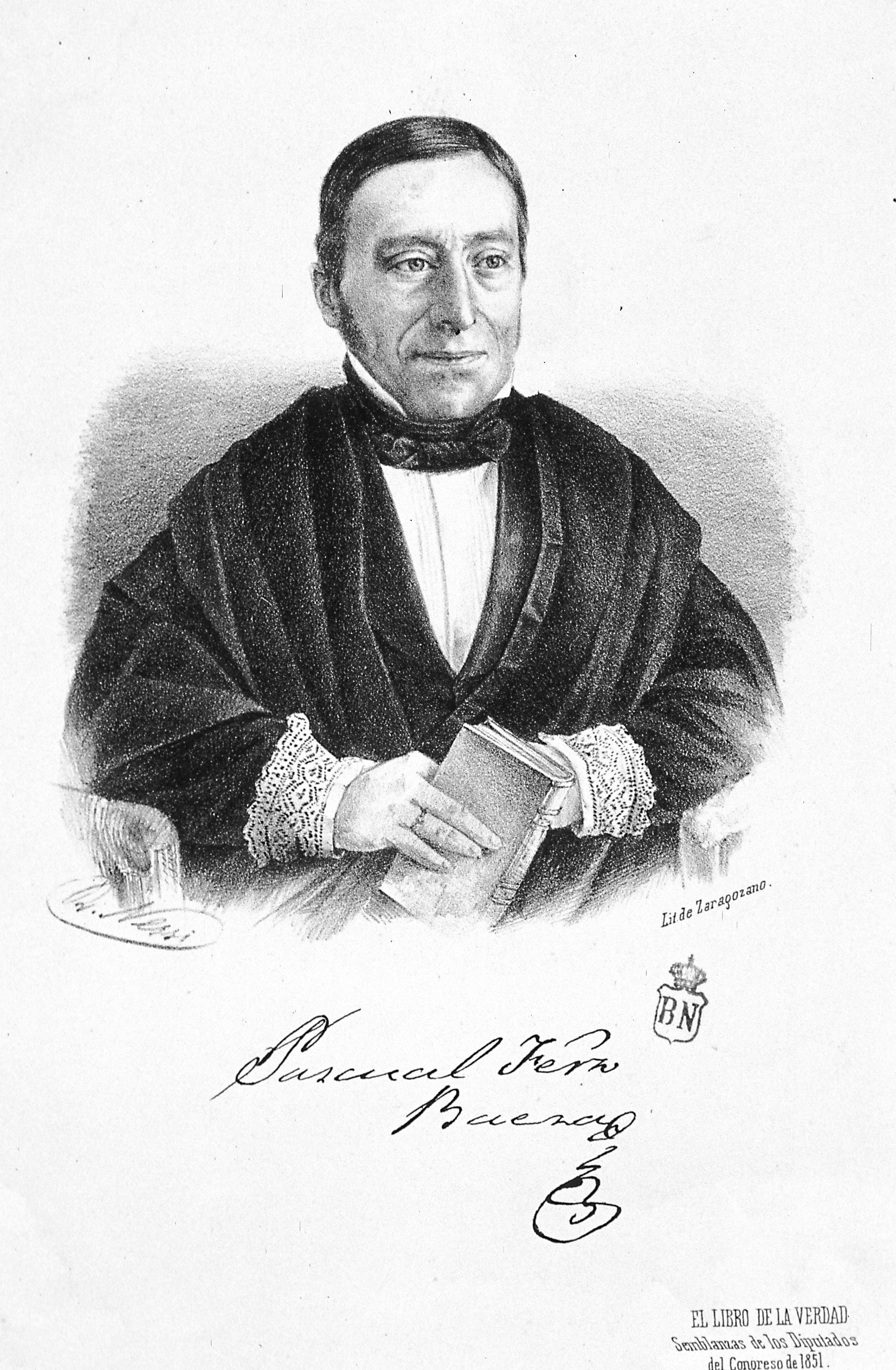 Retrato de Pascual Fernández Baeza